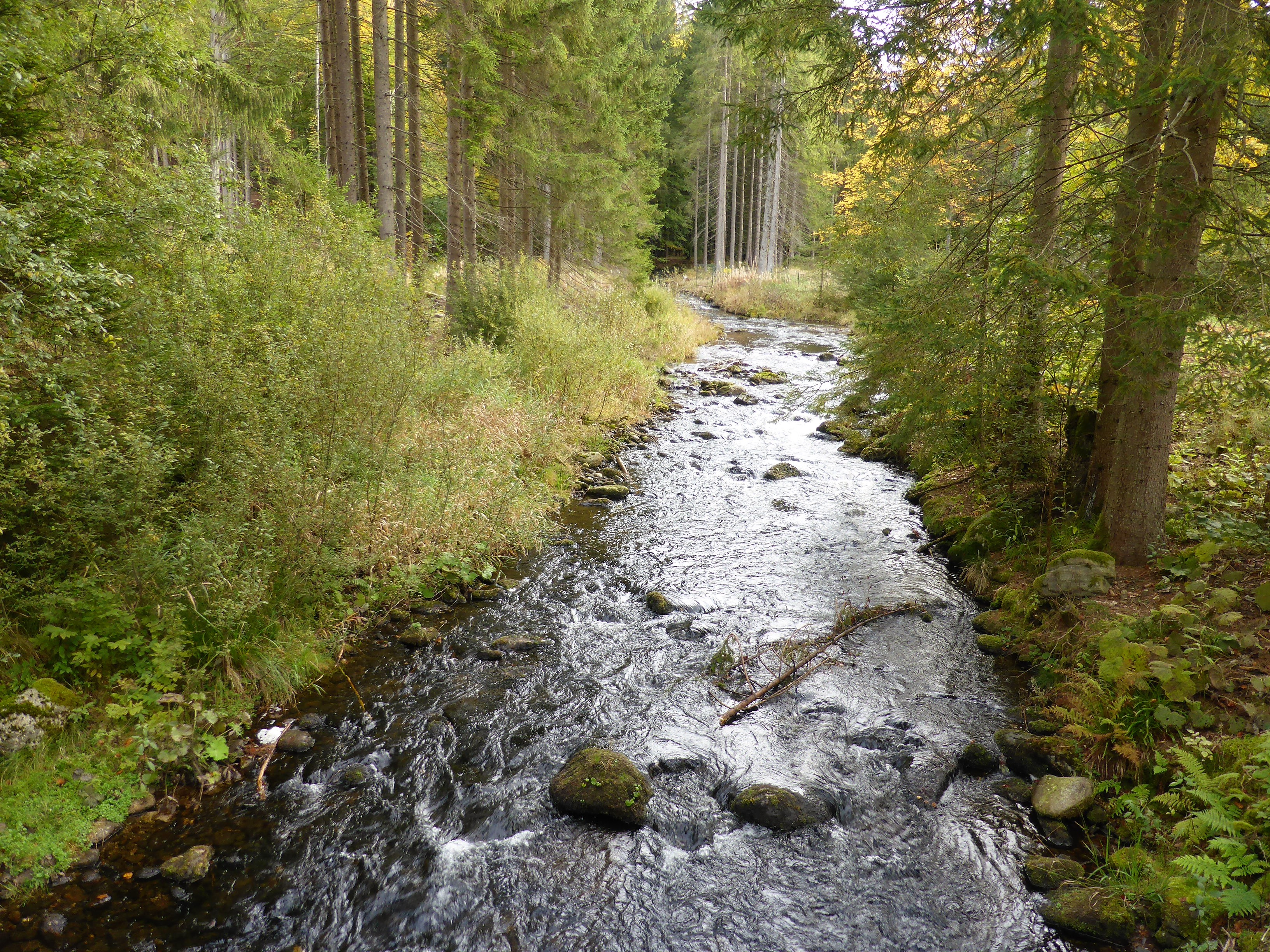 Fluss "Kleiner Regen" nach dem Austritt aus dem "Trinkwasserspeicher Frauenau". Die Aufnahme entstand am Wanderparkplatz "Talsperre Frauenau".